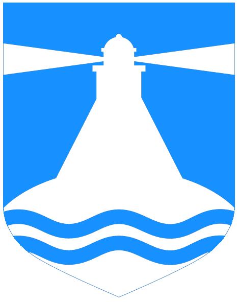 Hiiu valla vapp